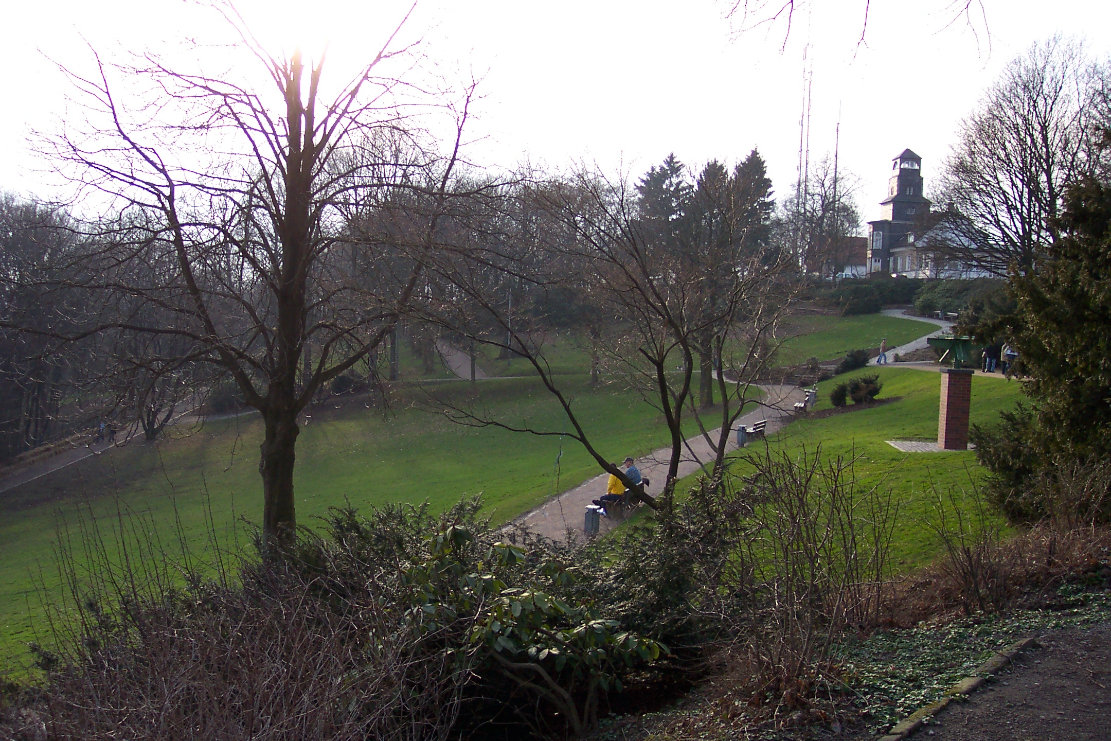 Nordpark, Wuppertal